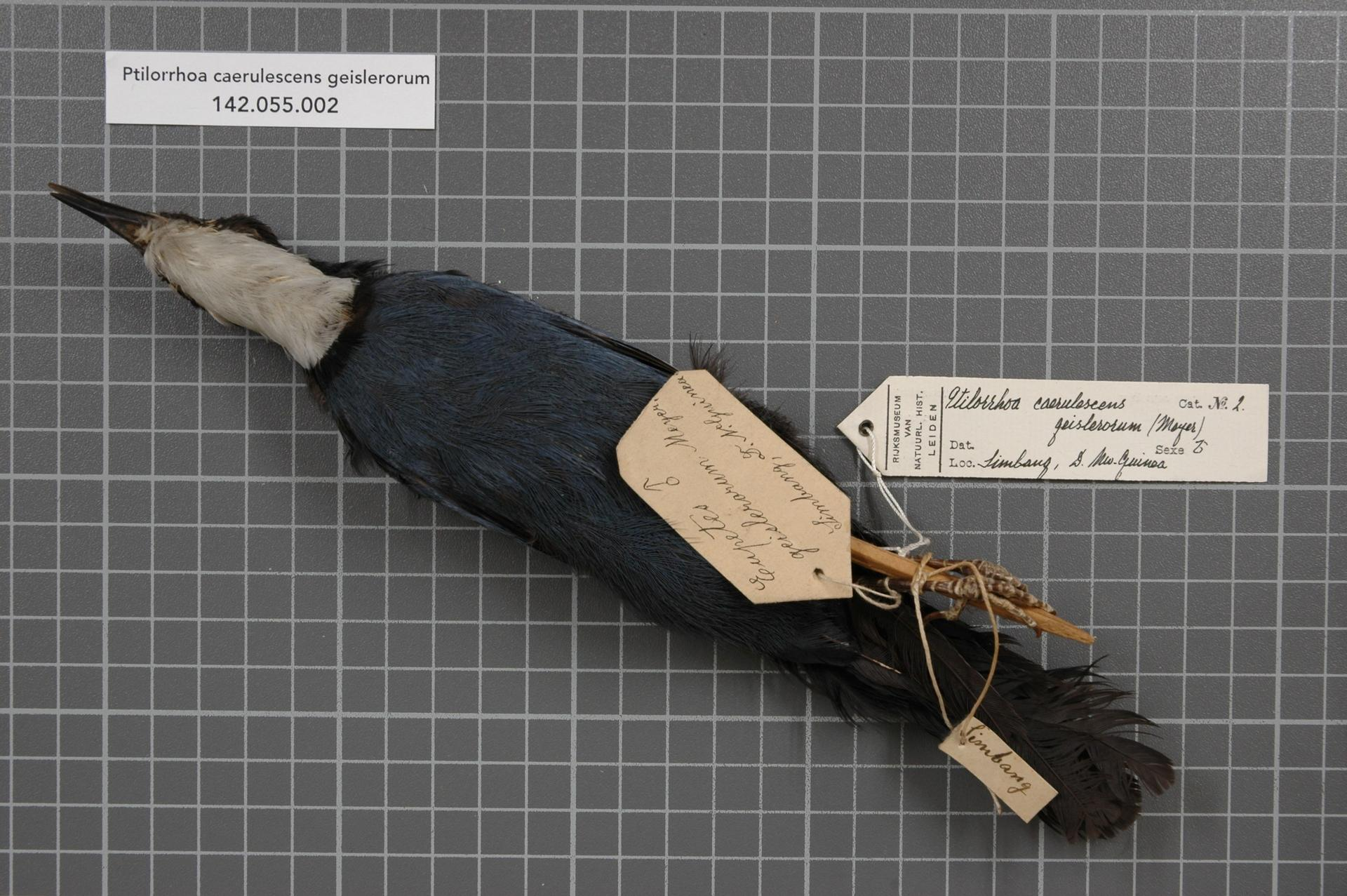 Ptilorrhoa caerulescens geislerorum (Meyer, 1892)